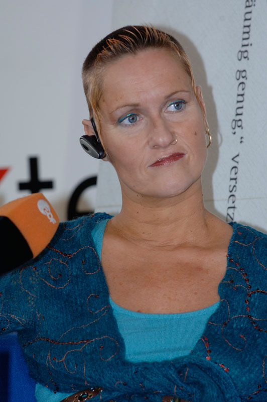 Alison Lapper auf dem Blauen Sofa